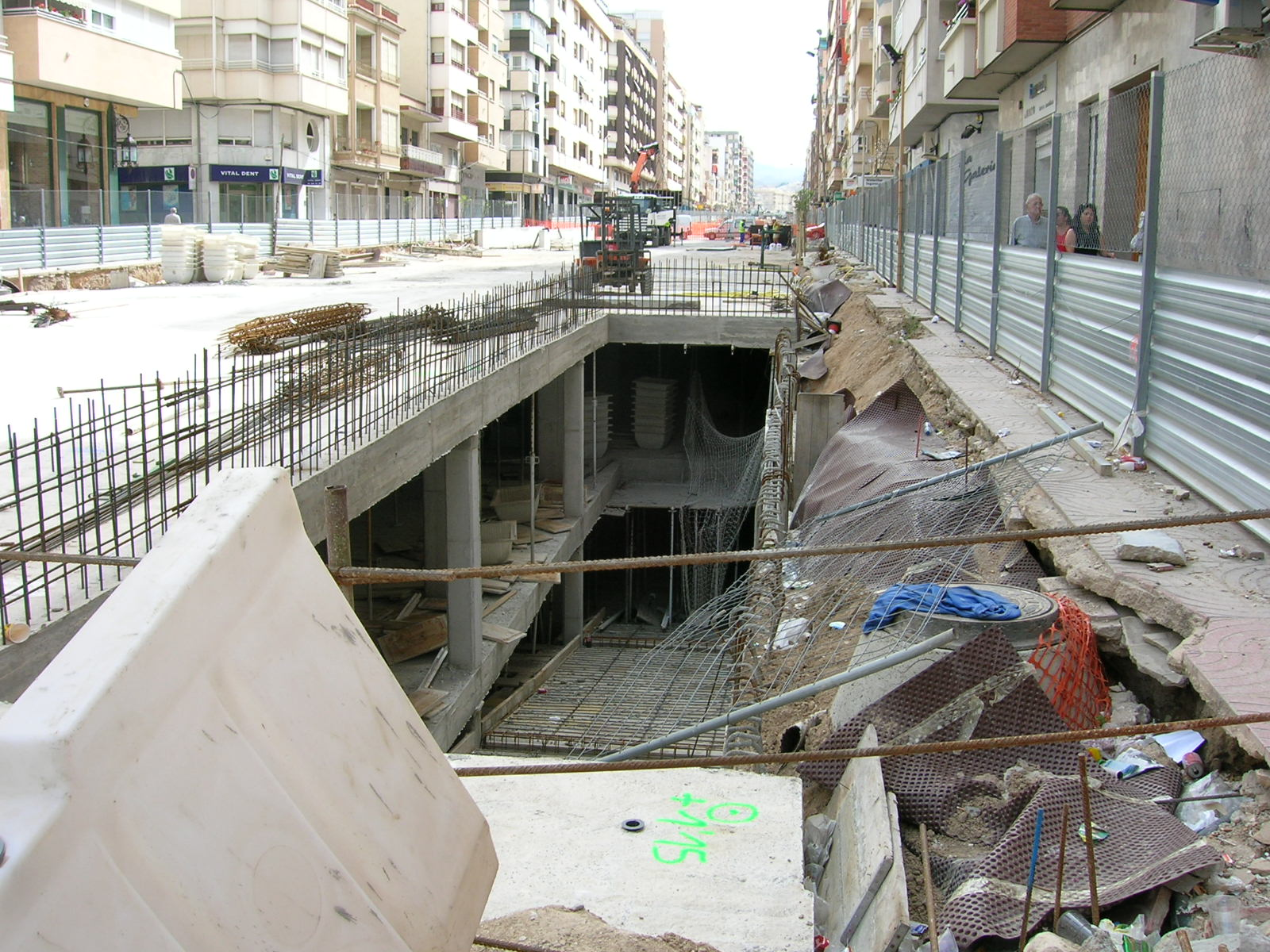 Obras en la Gran Avenida de Elda. 2006